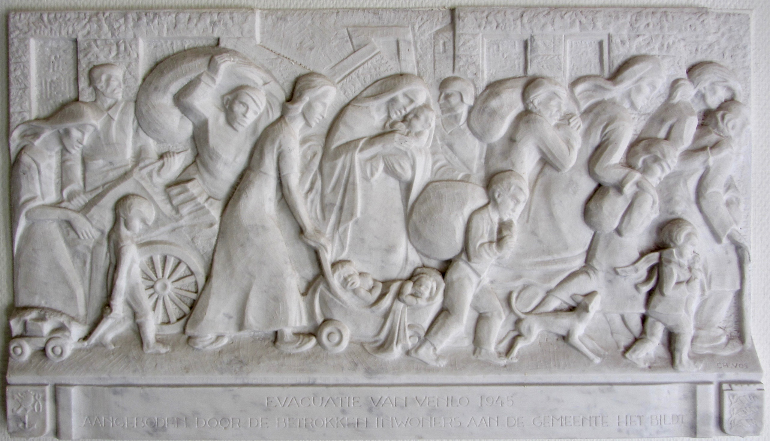 Charles Vos (1888-1954), 1946